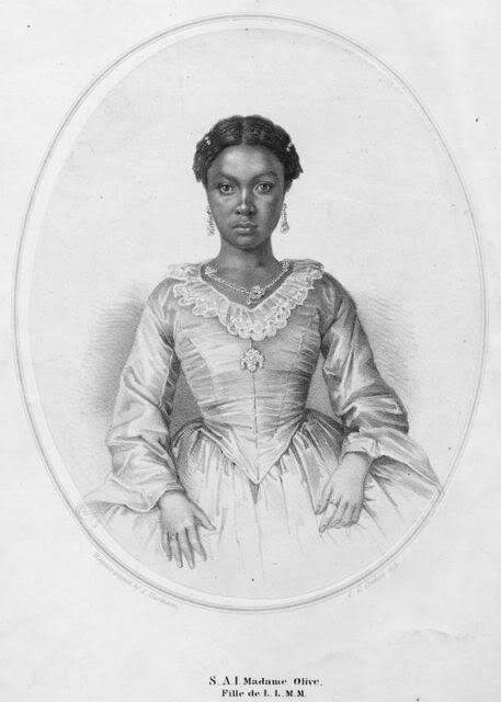 Приёмная дочь Фостена-Эли Сулука (император Гаити Фостен I) и родная дочь его супруги императрицы Аделины, кронпринцесса Гаити